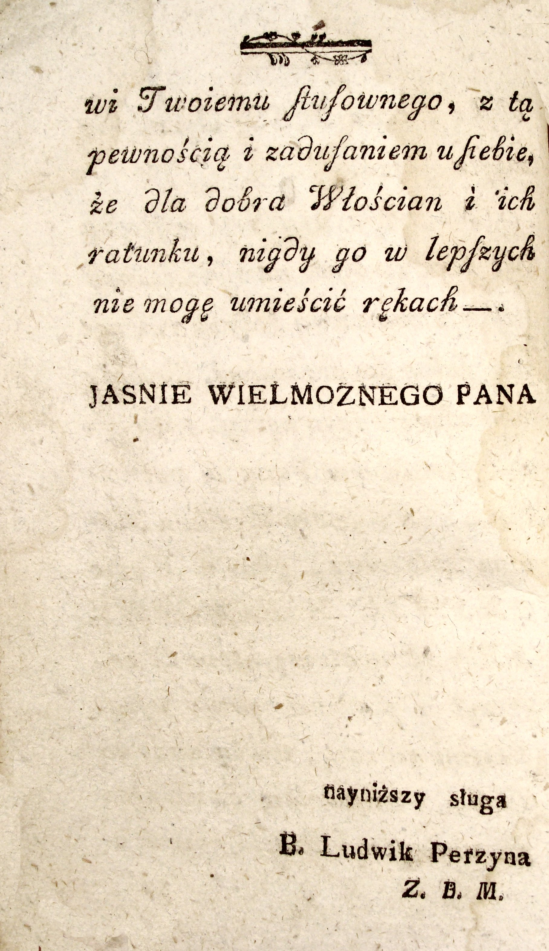 Druga strona dedykacji z Lekarza dla włościan Ludwika Perzyny